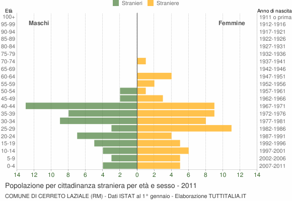 Grafico a piramide per l'età degli stranieri anno 2011 Cerreto Laziale